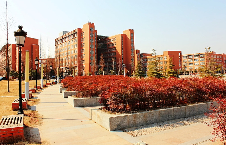 Zhengzhou University